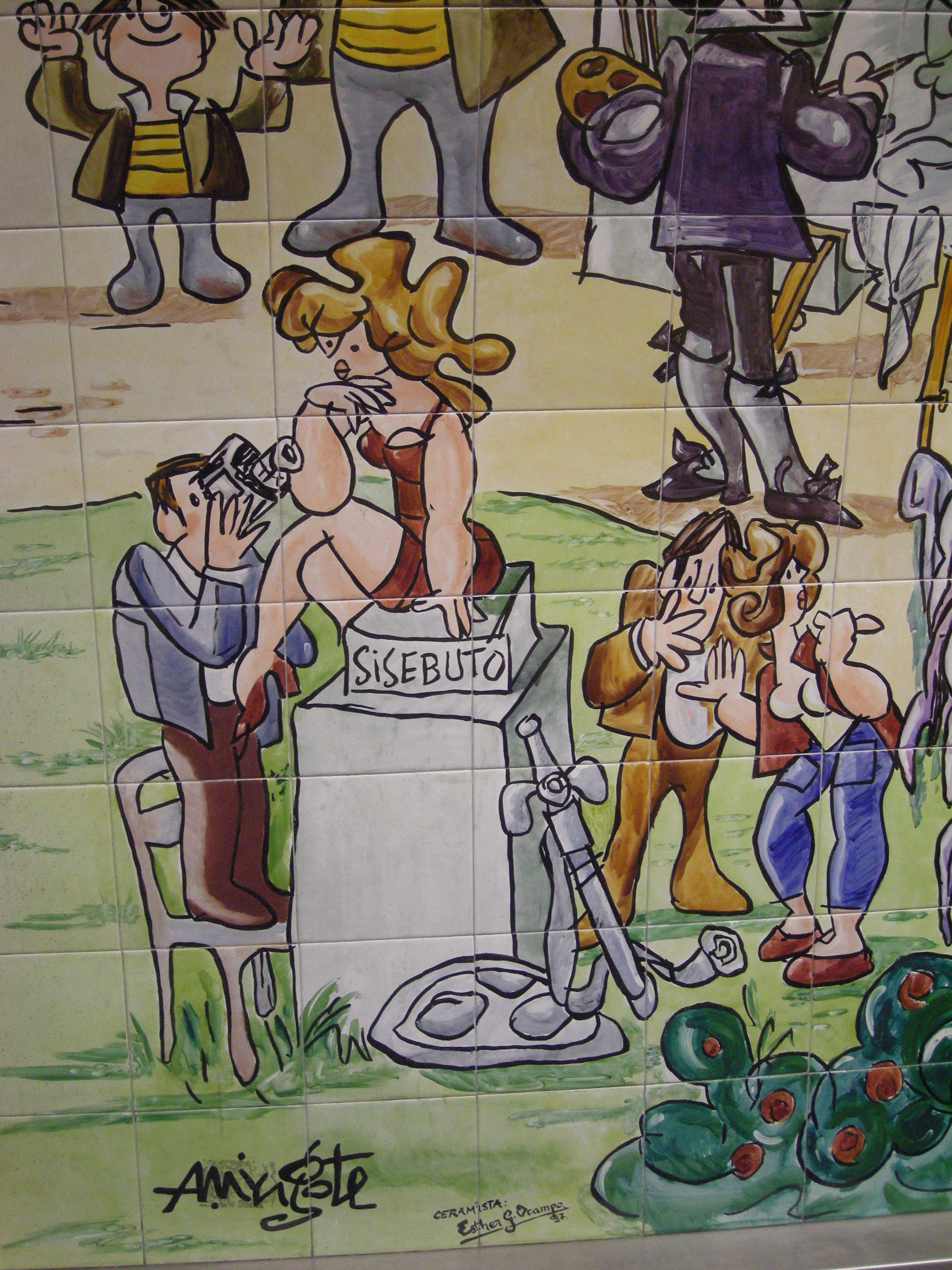 Mural de Antonio Mingote; Estación de Metro de Retiro, Madrid, España.